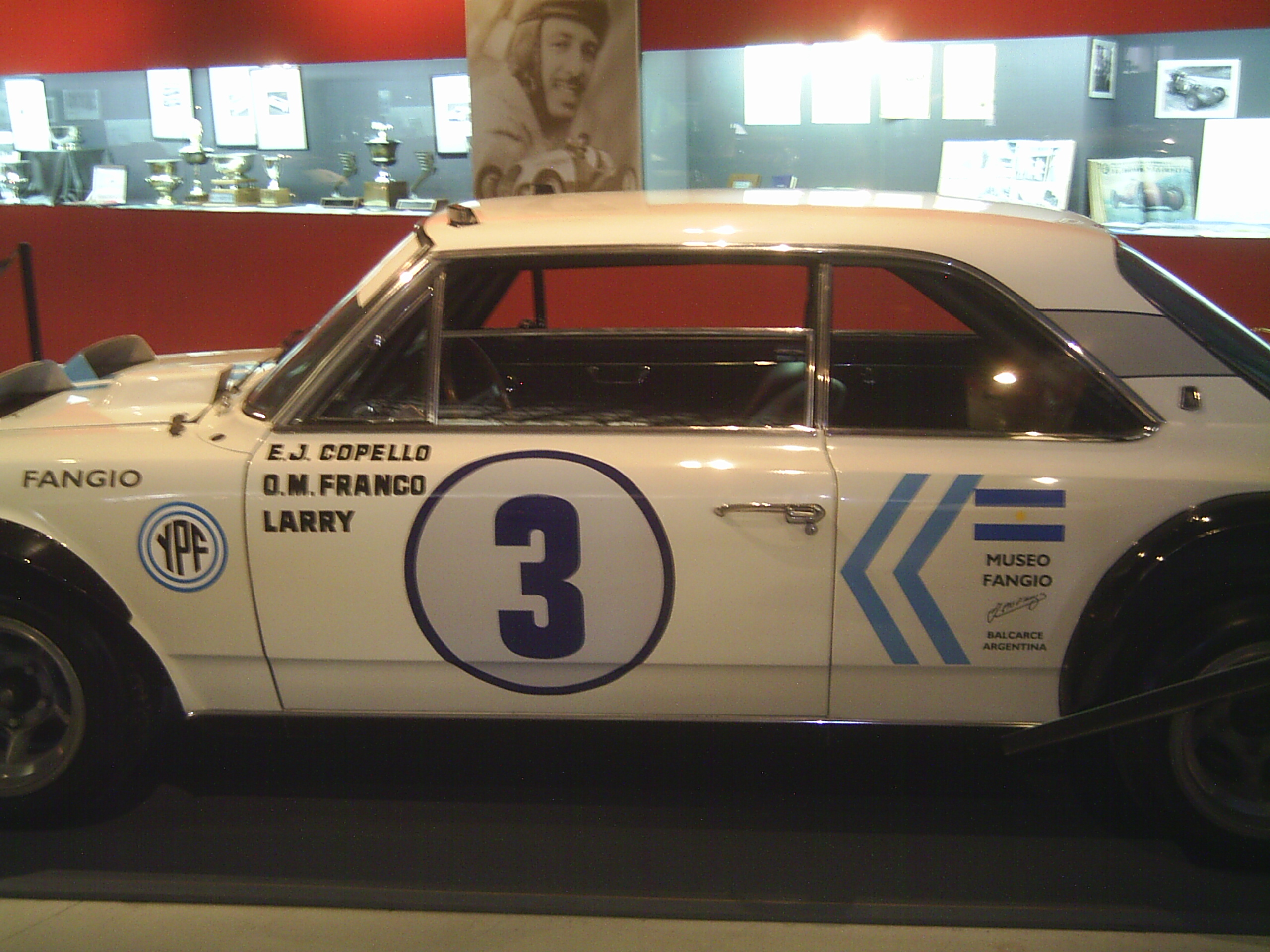 El famoso IKA Torino 380 W número 3, protagonista de la hazaña en Nürburgring, en el Museo del automovilismo.